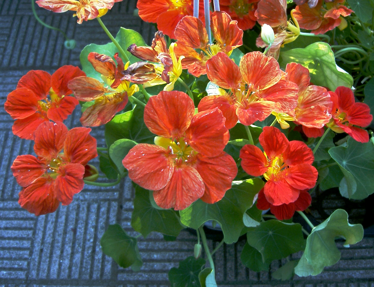 “Tropaeolum majus”.Japan